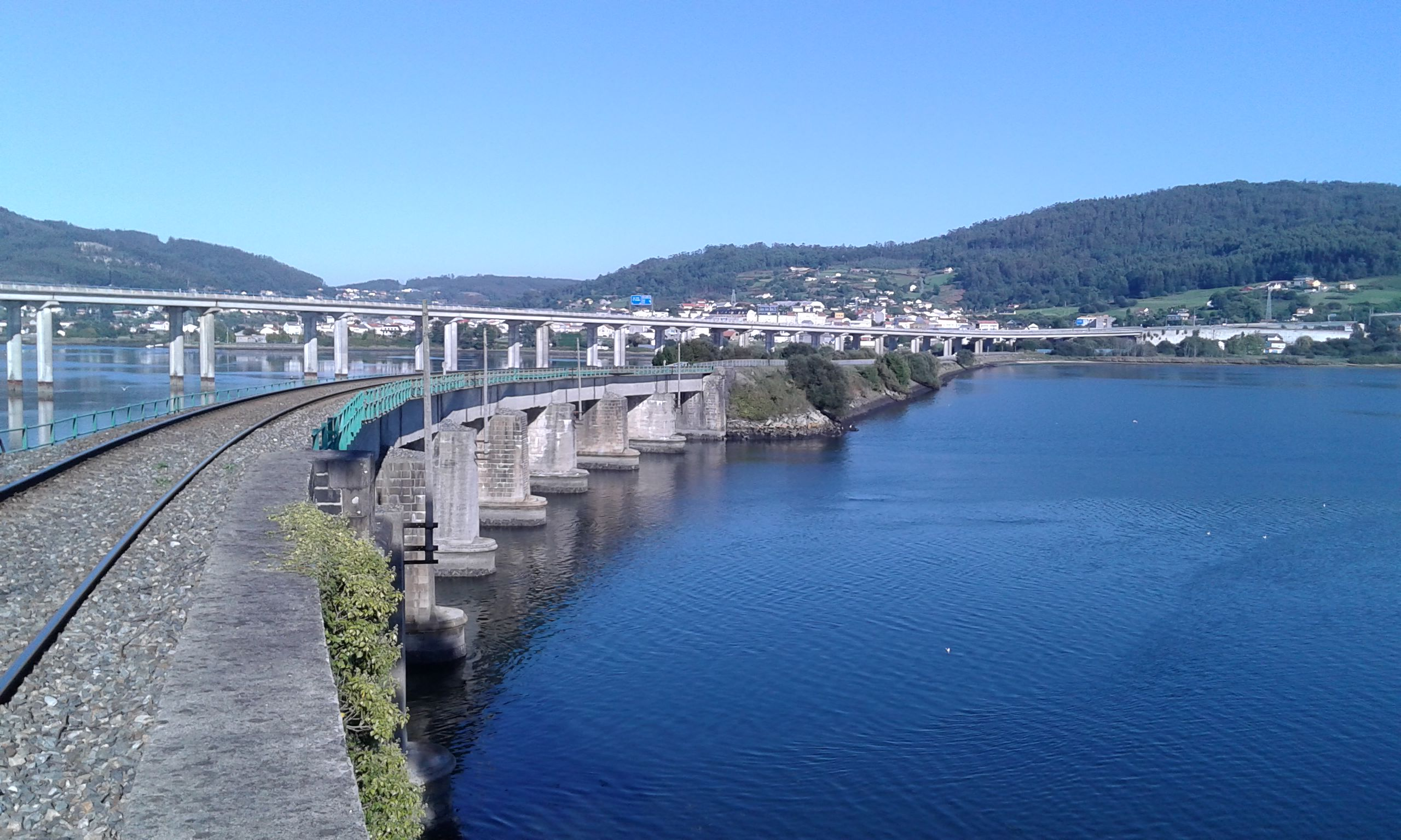 Puente del ferrocarril sobre la Ría de Ferrol. Comunica Neda y Narón.